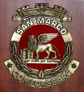 COMFORSBARC, La forza da sbarco della Marina MIlitare